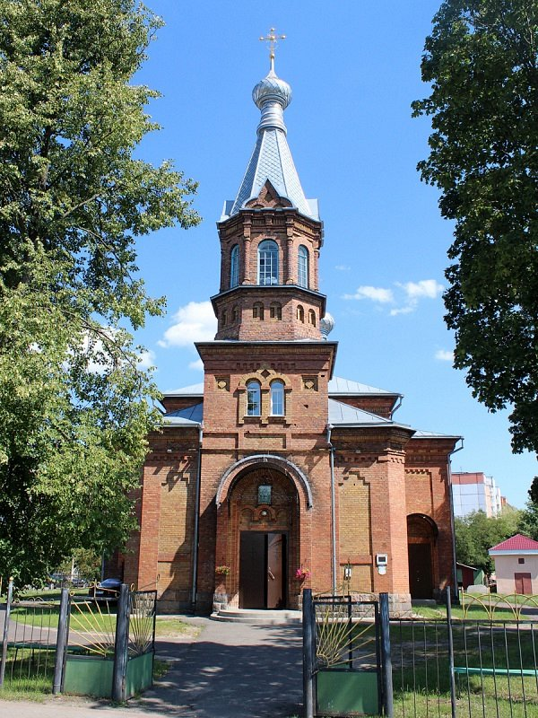 Лунінец. Свята-Крыжаўзвіжанская царква